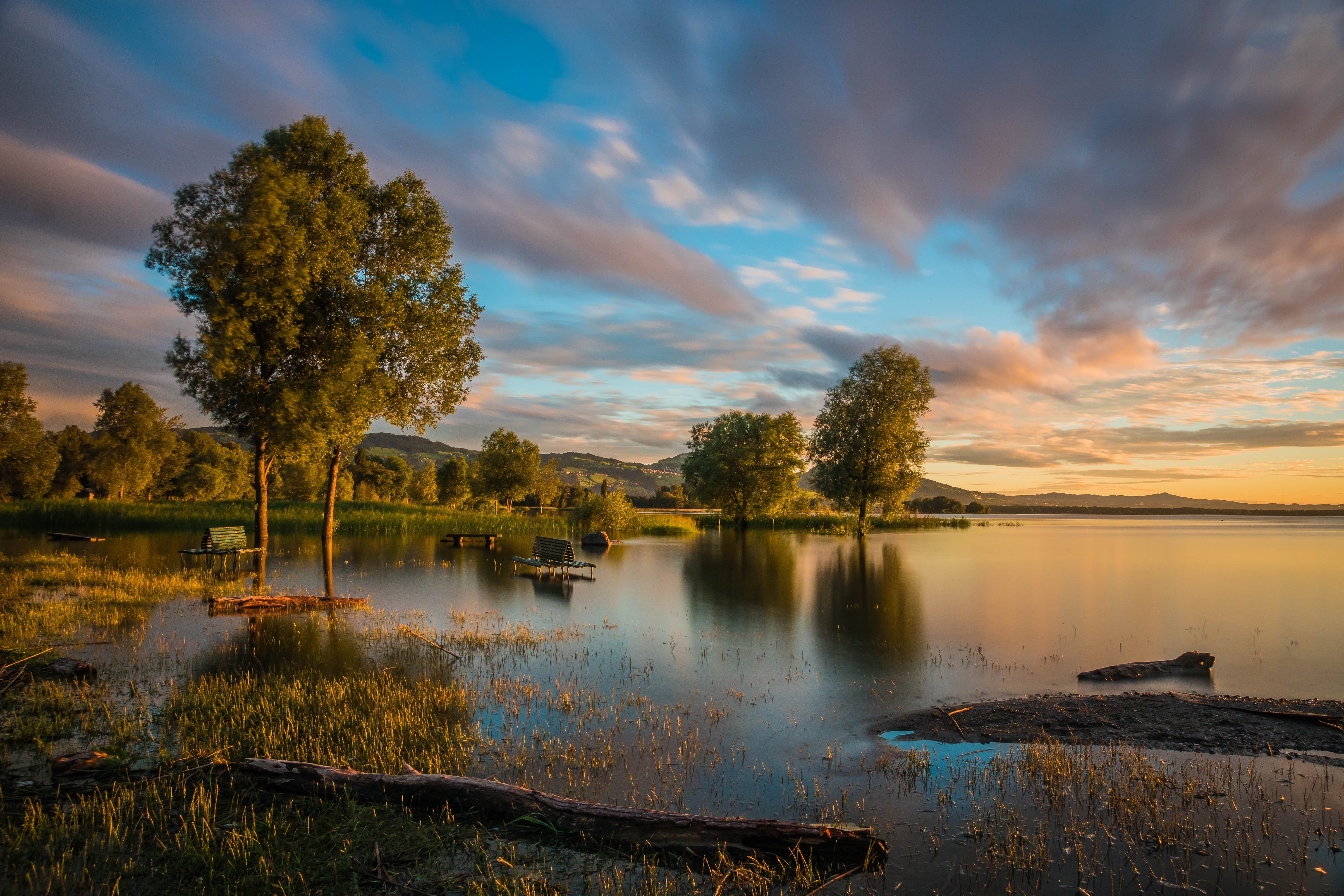 kurz vor Sonnenuntergang kam die Sonne nochmals mit tollen Wolkenhimmel raus (Rohrspitz, Vorarlberg, Österreich)